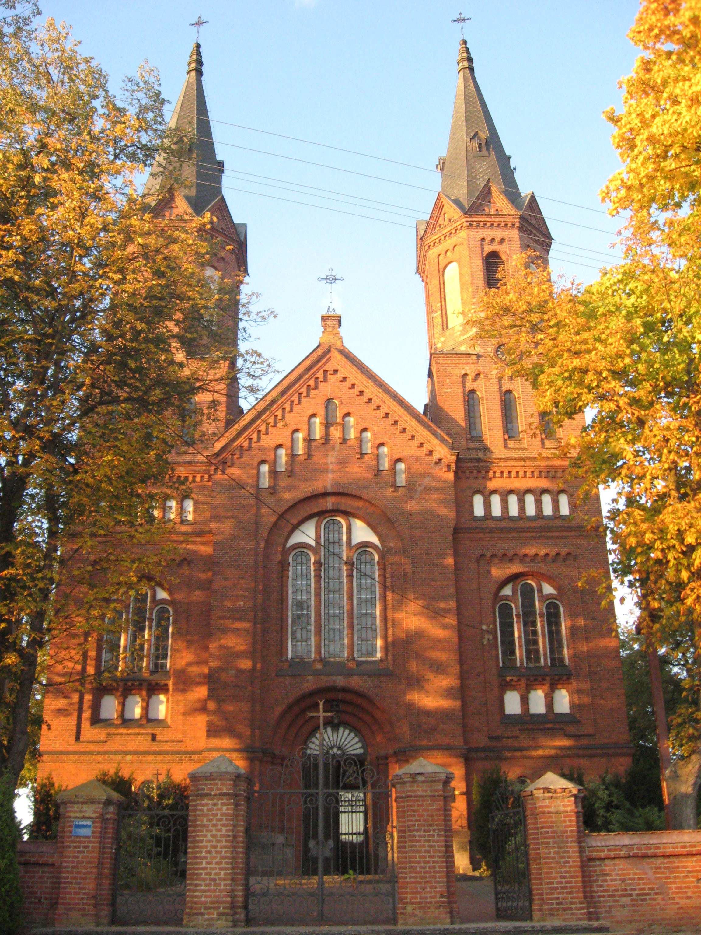 kościół par. p.w. św. Bartłomieja, 1903 Grębków (zabytek nr A-308)